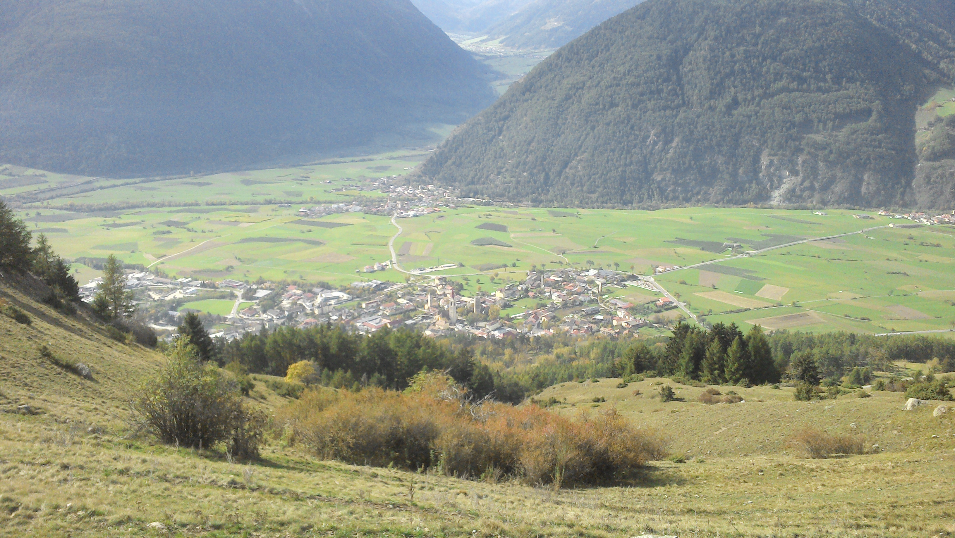 Malettes mit Sicht auf Mals, Laatsch und Schleis